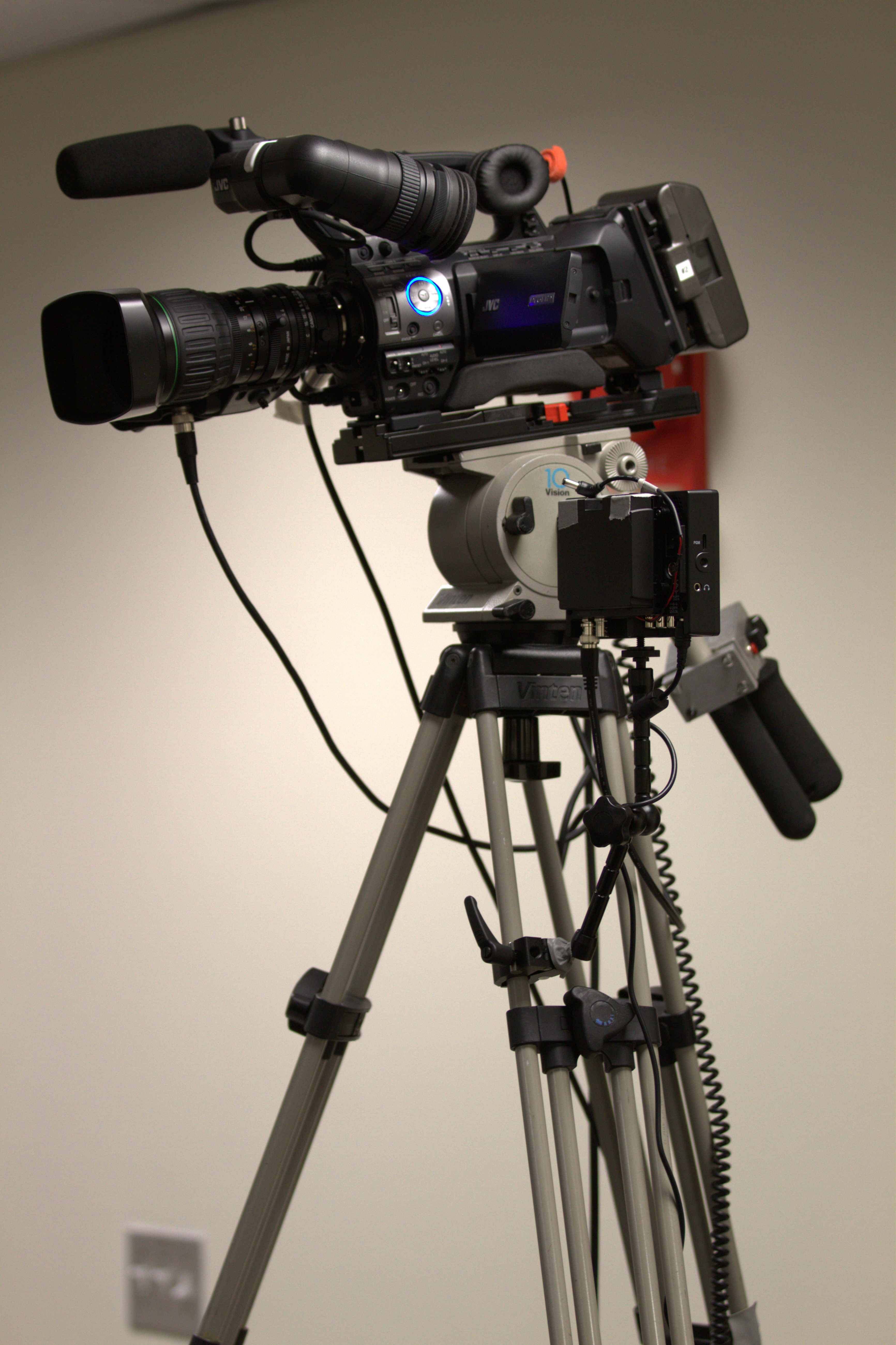 Wikimania 2012, Washington DC